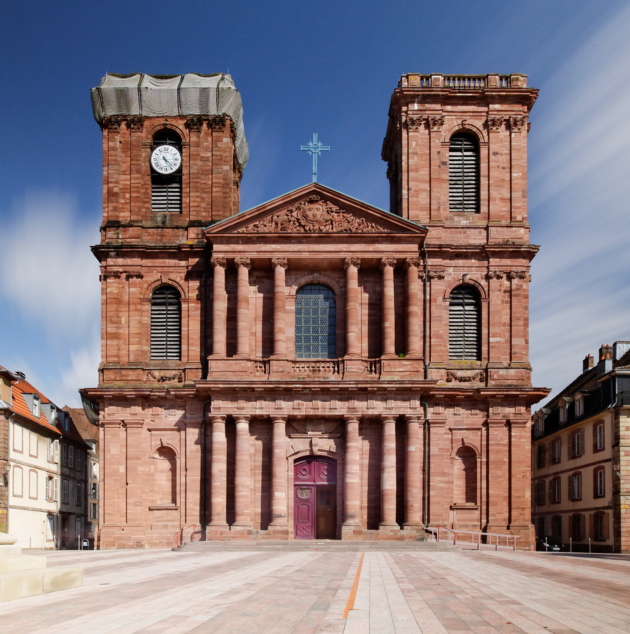 Cathédrale Saint-Christophe de Belfort. Photo réalisée avec un filtre Hoya ND16 + Hoya ND1000 + un filtre polarisant Hoya PRO1. Édifice classé Monument Historique sous le n° PA00101135.